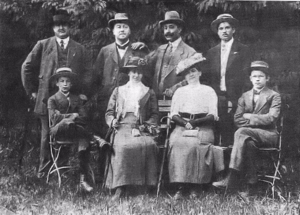 Familienmitglieder der Familie Speidel, Limenaria Thasos (1914)